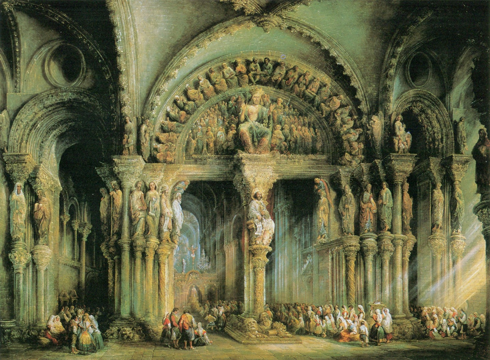 La obra representa el Pórtico de la Gloria de la catedral de Santiago de Compostela, en Galicia, (España).